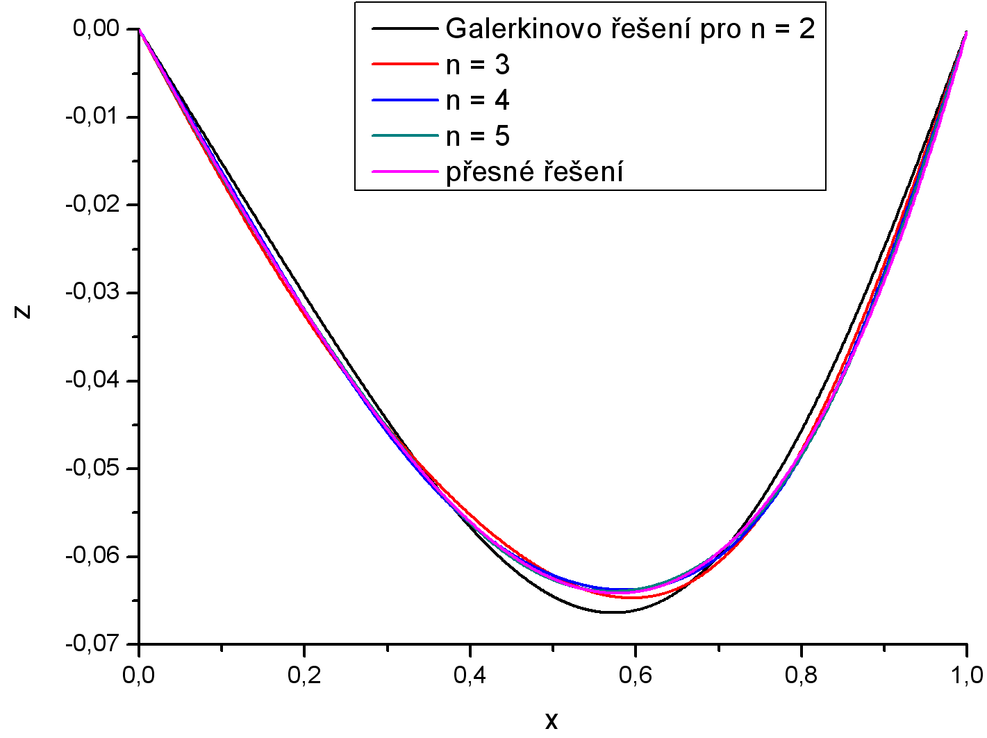 Přesné řešení diferenciální rovnice a aproximovaná řešení ve tvaru řadu pro různý počet sčítaných členu řady